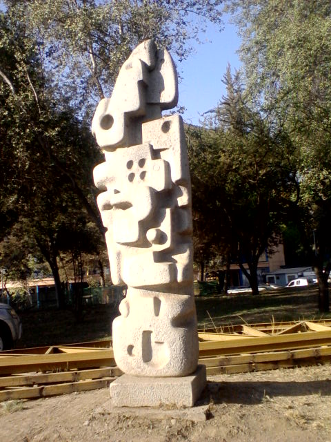 Obra del escultor chileno Samuel Román exhibida en la Facultad de Filosofía y Humanidades de la Universidad de Chile